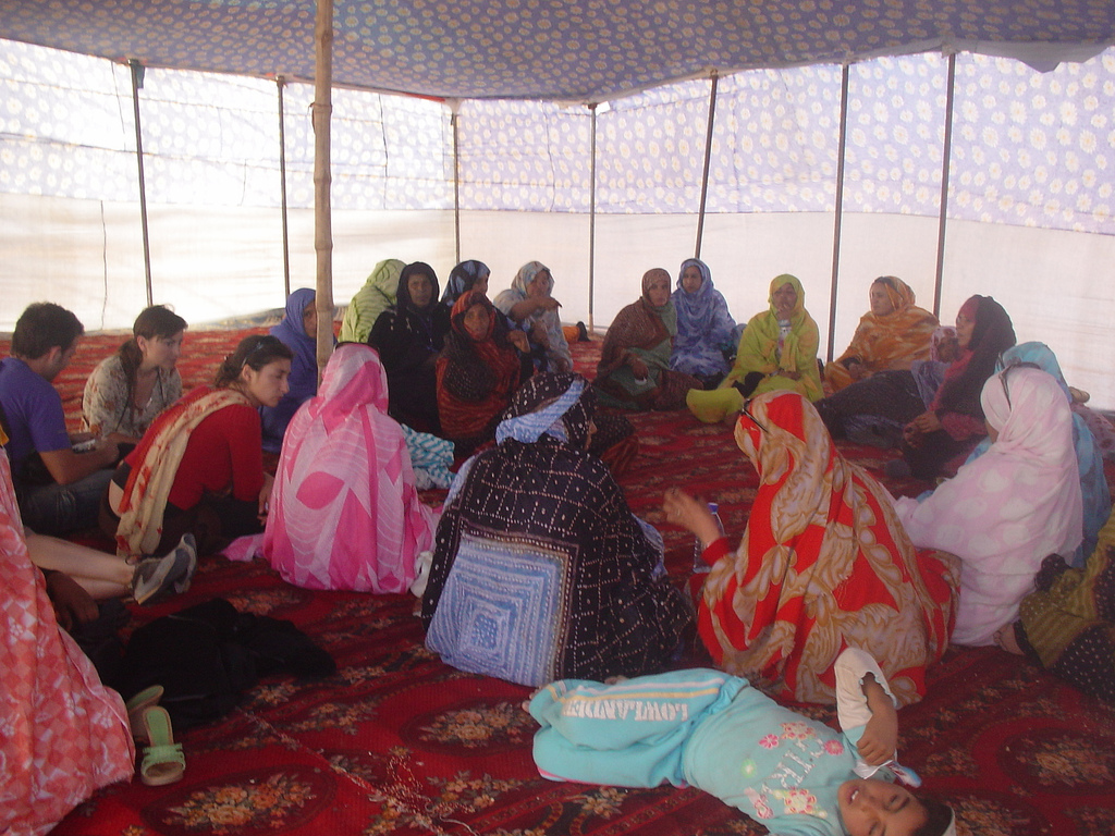 Gaikako tailerrak. Discusion en talleres sectoriales. Argazkia/Foto: Plazandreok. Banaketa librea/Libre distribución. Los días 5, 6 y 7 de abril se celebrará en los campamentos de Tinduf el V. Congreso Nacional de las Mujeres Saharauis. Desde Bilbao ha partido una delegación de mujeres pertenecientes a la red de apoyo a la UNMS (Unión Nacional de las Mujeres Saharauis). Texto completo.